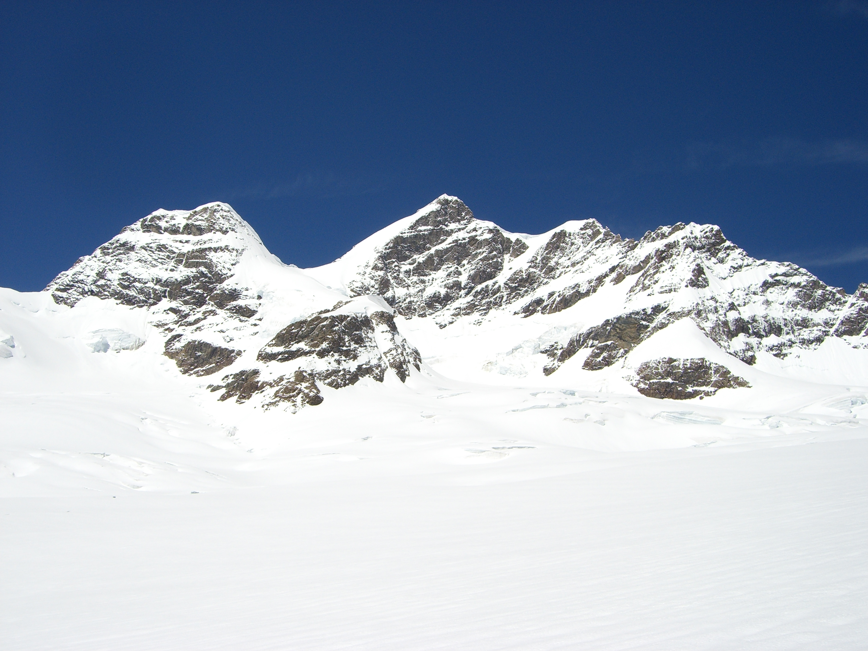 Jungfrau from SE, from left: Rottalhorn (3975), Jungfrau (4158) and Wengen-Jungfrau (4089)